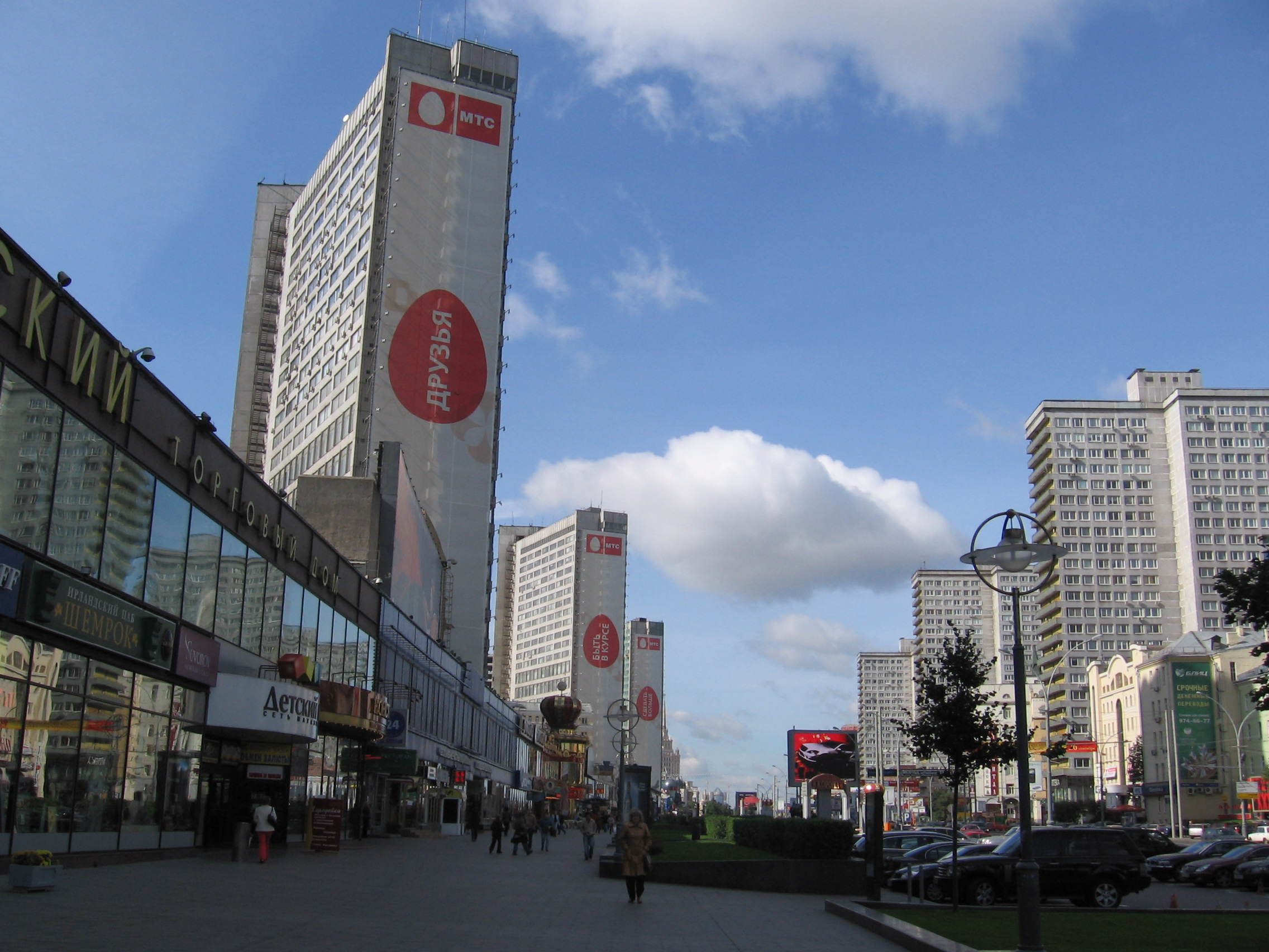 Новий Арбат